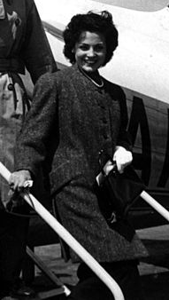 Detalle de una fotografía mayor en la que se ve a la actriz y cantante española Carmen Sevilla descendiendo de un avión en el aeropuerto de Madrid-Barajas.